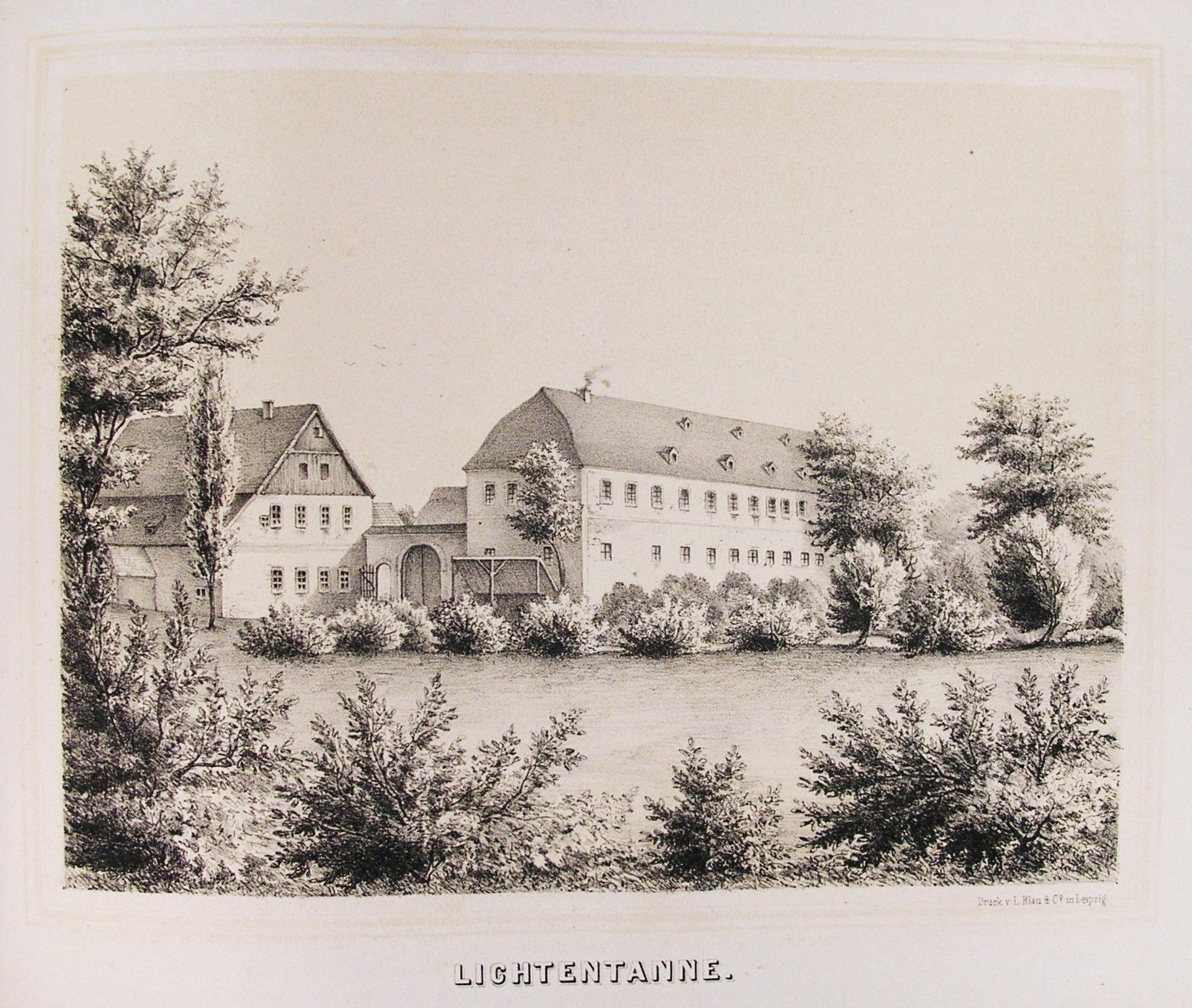 Ehemaliges Rittergut zu Lichtentanne